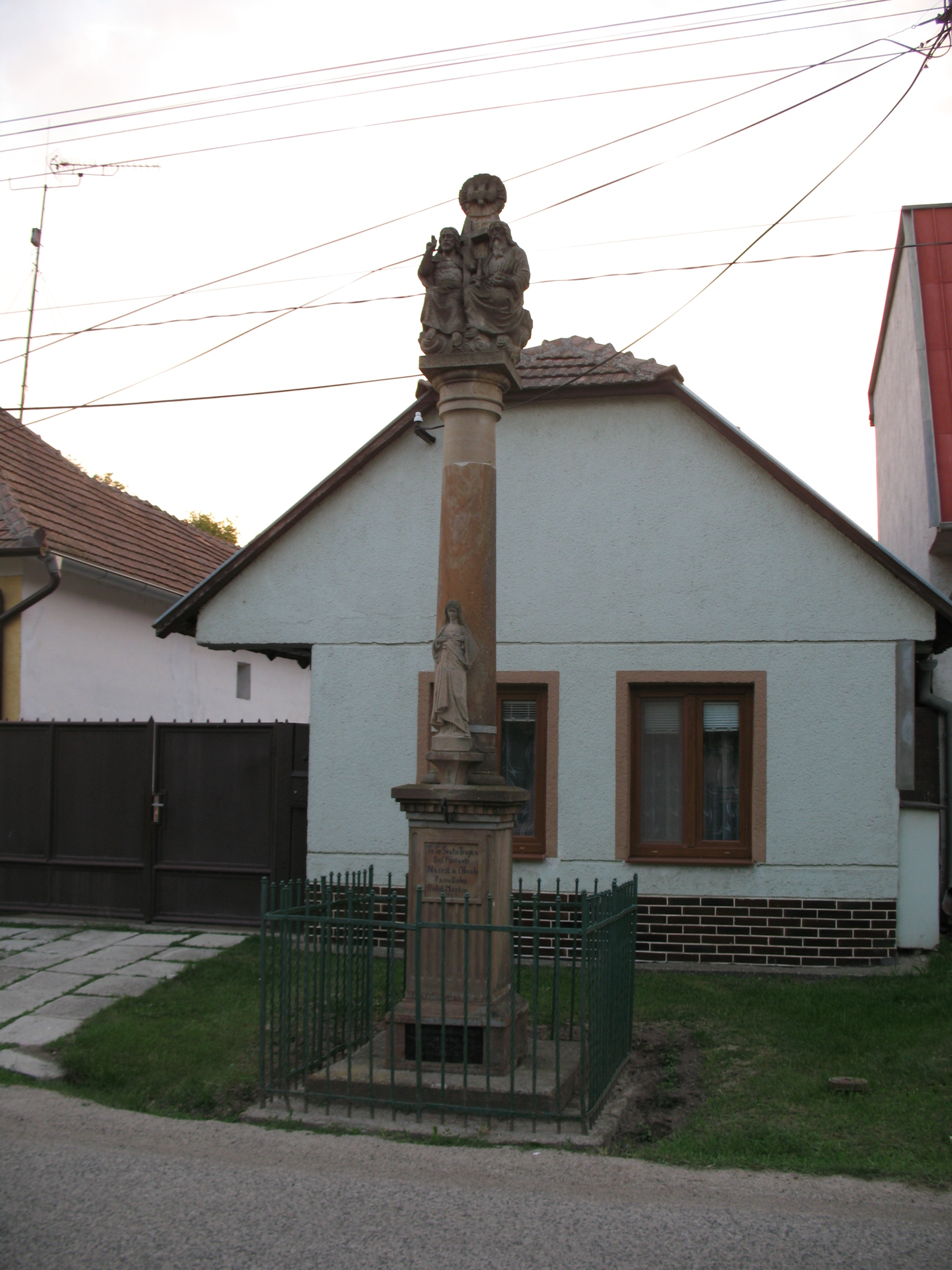 Bresztovány